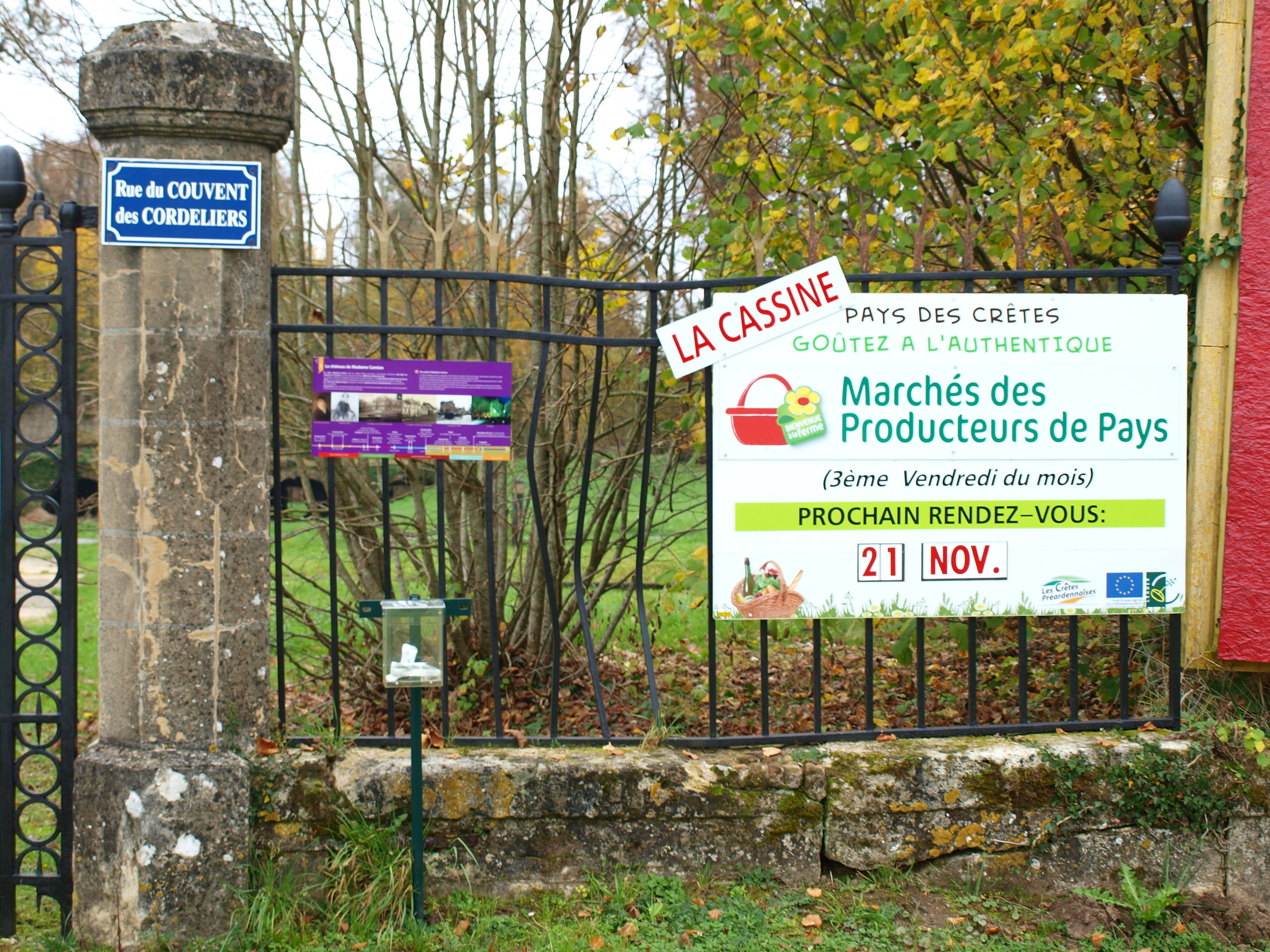 La Cassine (Vendresse, Ardennes, France) ;panneau info du marché